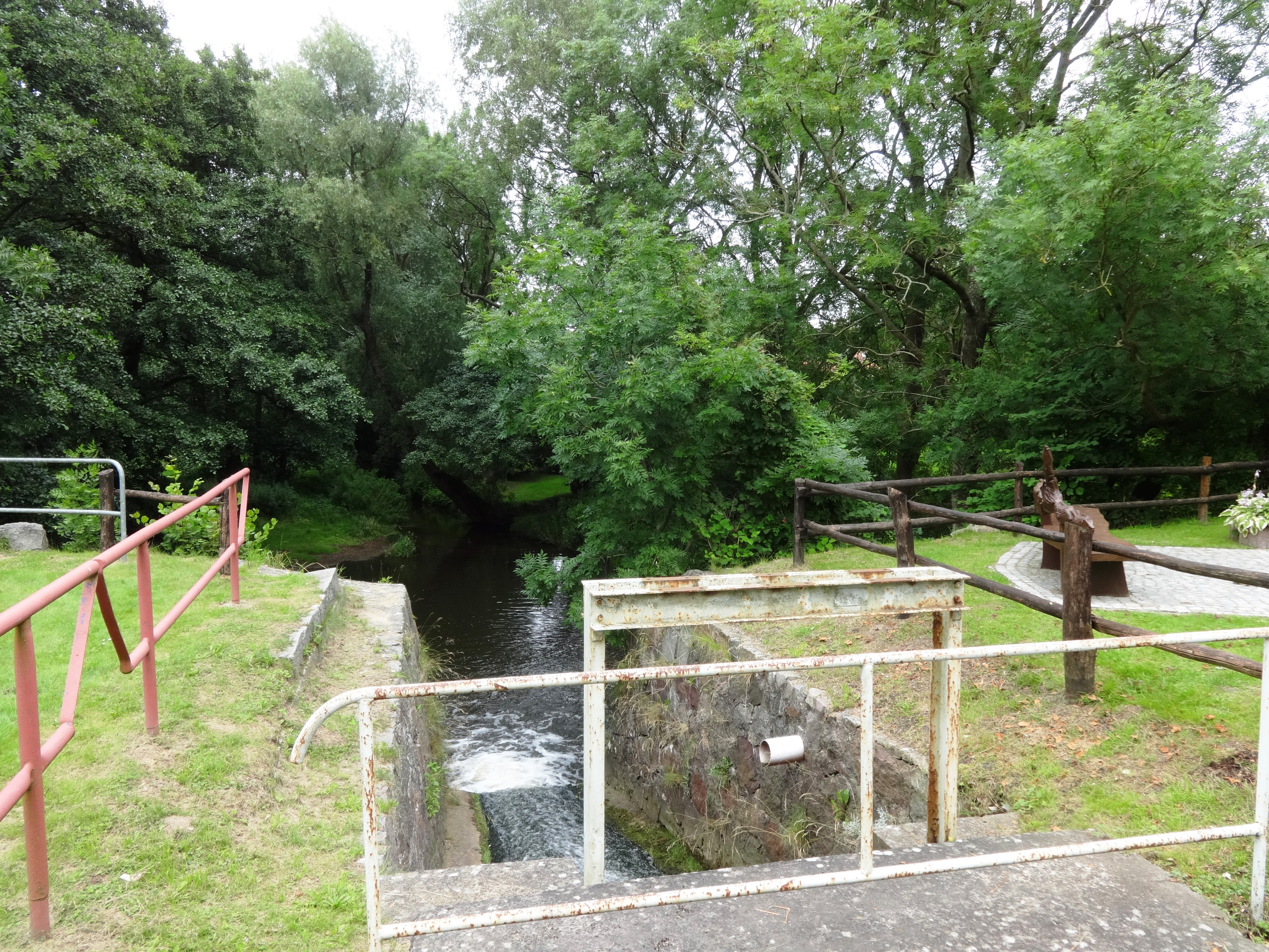 Kemnitz, eine Gemeinde im Landkreis Vorpommern-Greifswald in Mecklenburg-Vorpommern